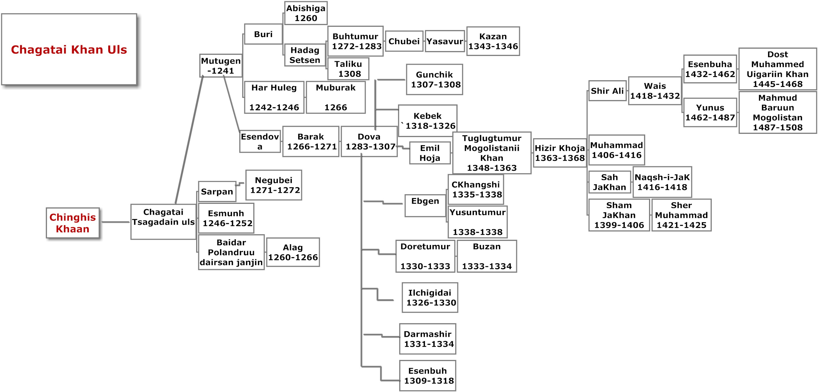 Цагаадайн улс